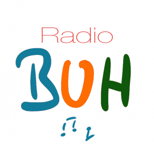 Logo Radio BUH